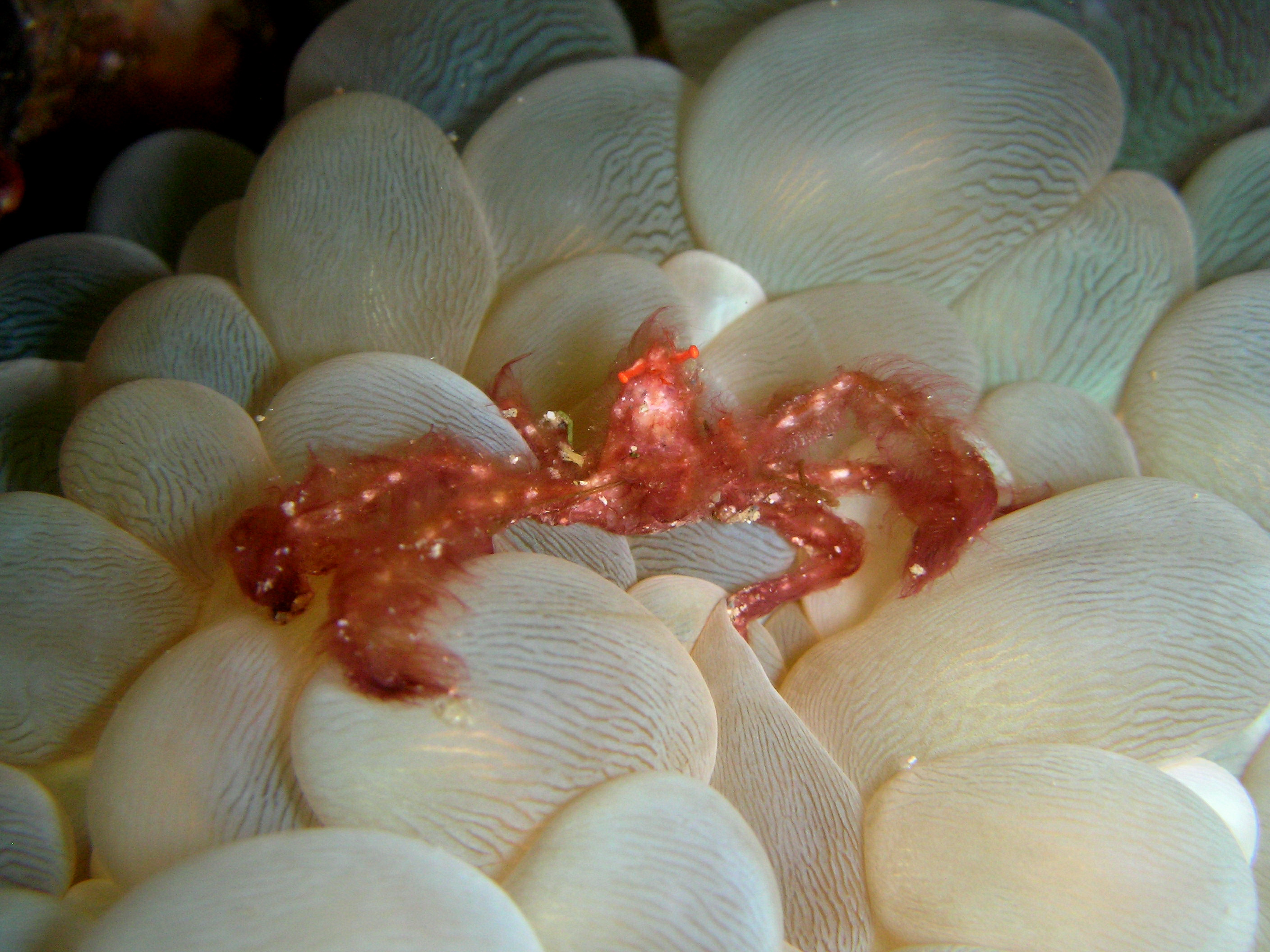 Achaeus japonicus